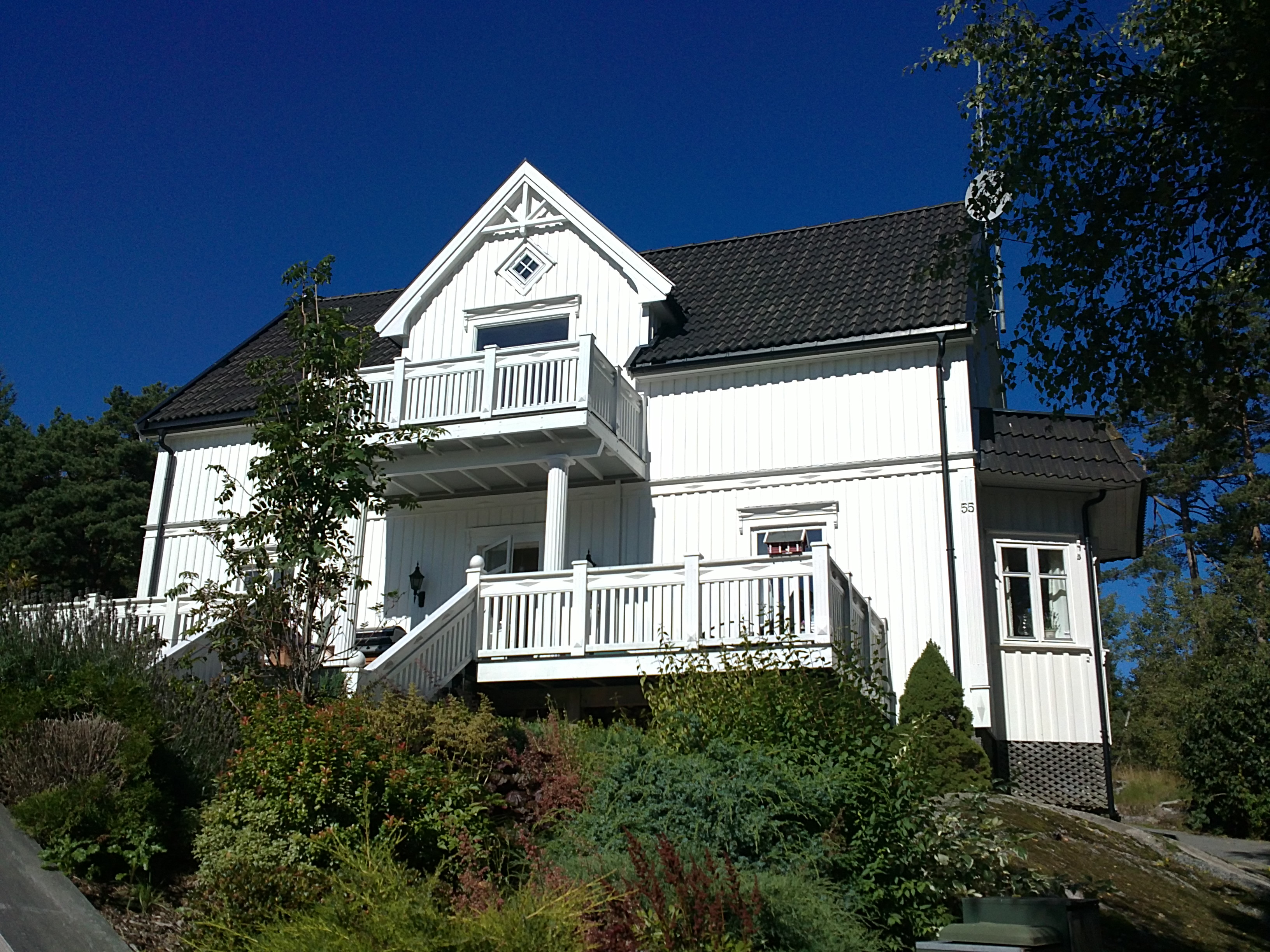 Bilde av tidligere Skytterlagets hus